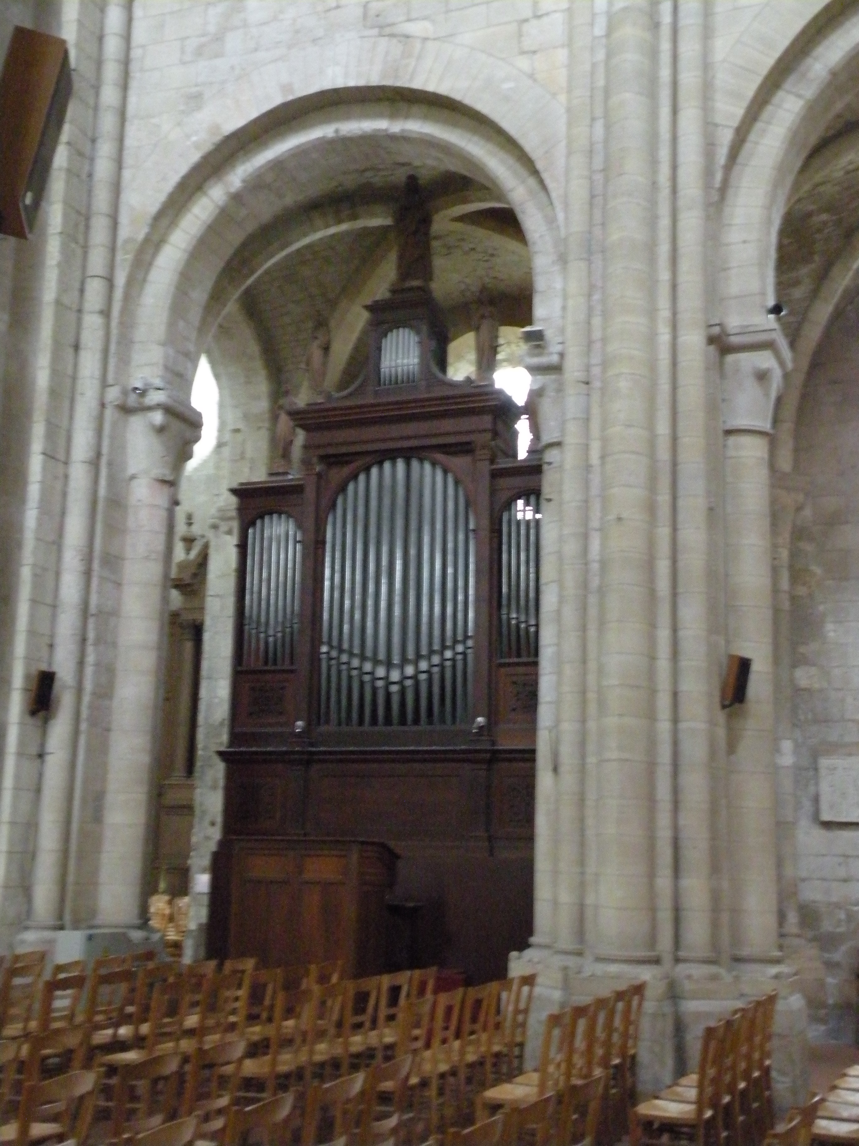 orgue de chœur de l'Église Saint-Étienne de Beauvais